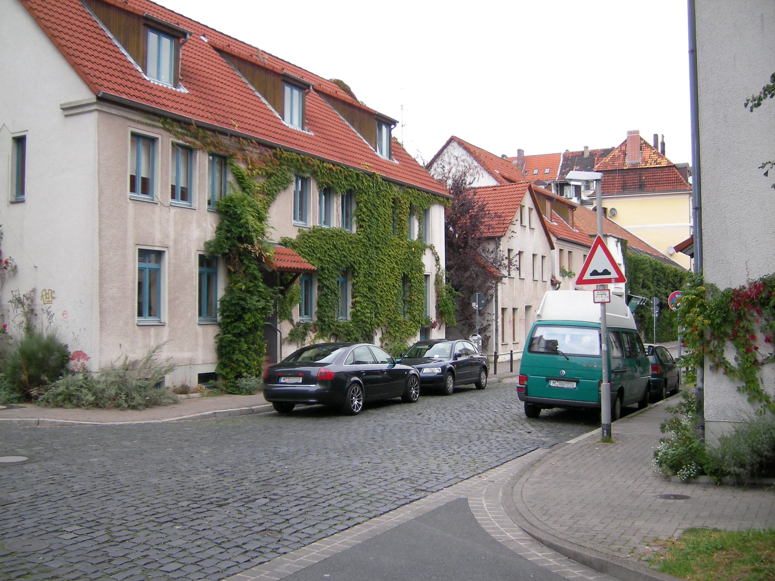 Viktoriastraße in Hannover-Linden-Nord